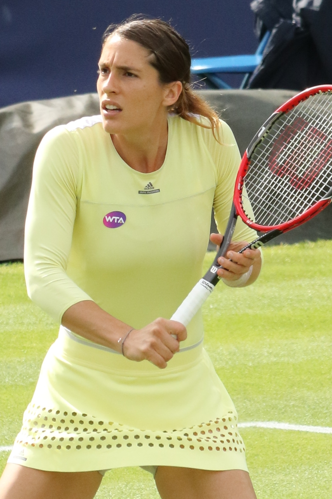 Petkovic BM16 (14)